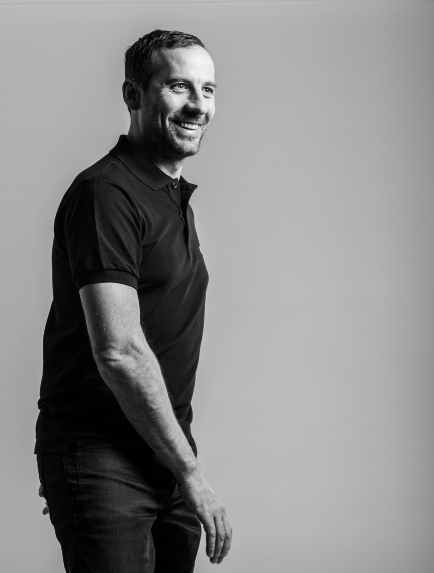 photo